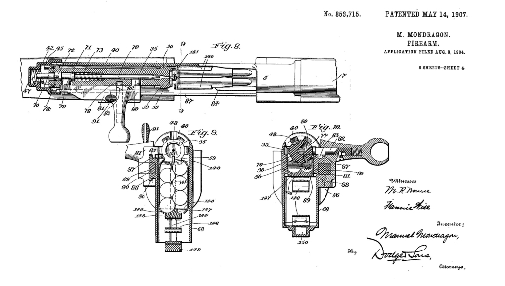 Mondragon Patent verschluss